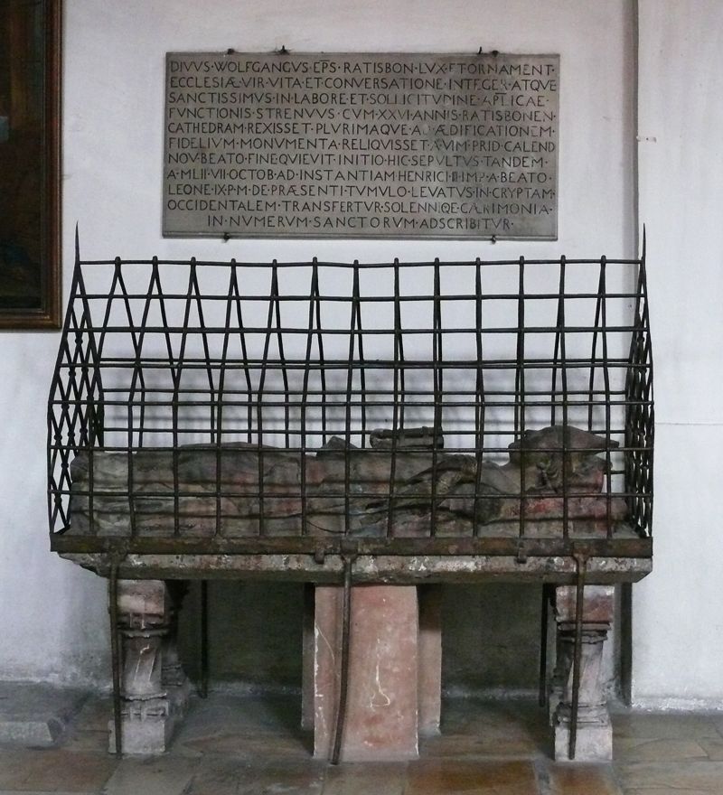 Saint Wolfgang in St.Emmeram in Regensburg